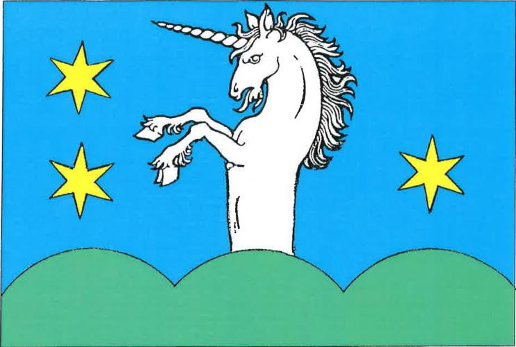 Jaroměřice vlajka